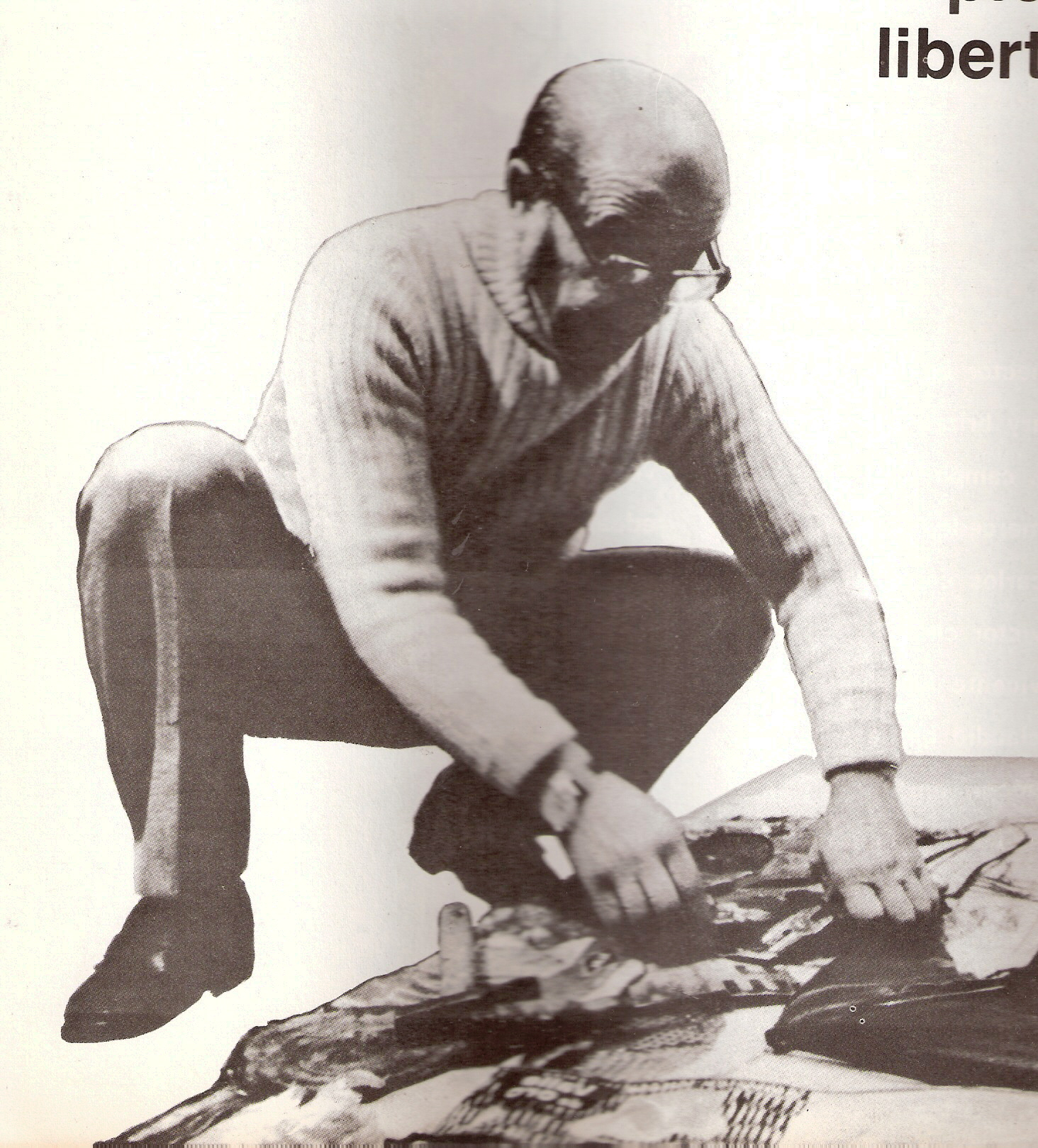 Antonio Berni, pintor argentino